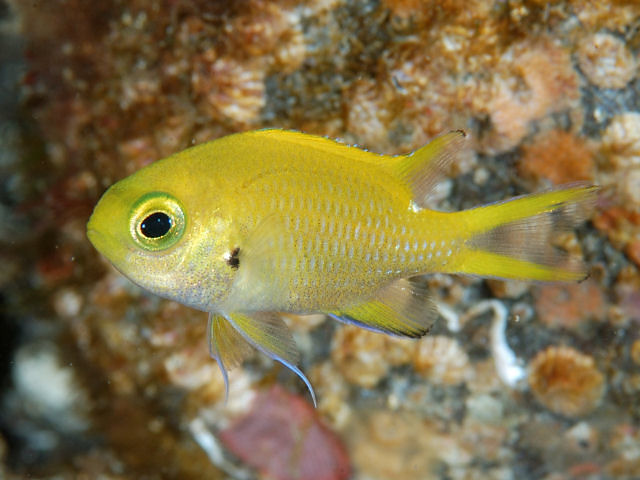 ナノハナスズメダイ Chromis katoi